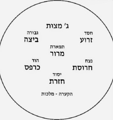 קערת ליל הסדר (ע"פ האר"י)